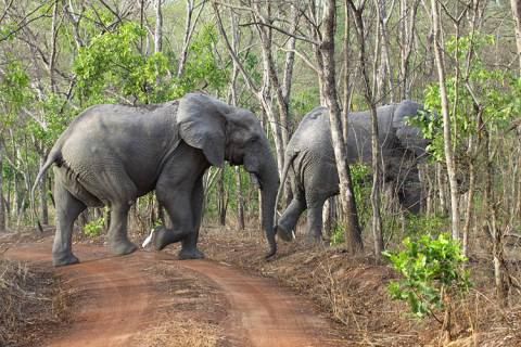 Image de deux éléphant du parc Pendjari